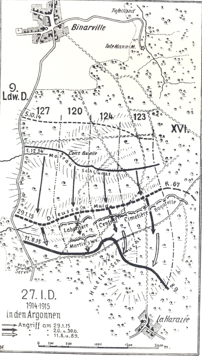 Karte Seite 42: 27. Infanterie-Division Argonnen 1915